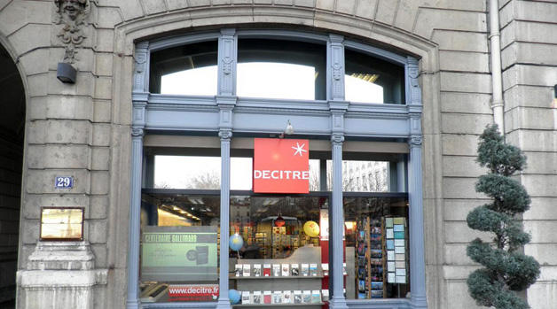 Photo vitrine librairie Decitre Bellecour